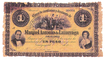 Billete de hacienda